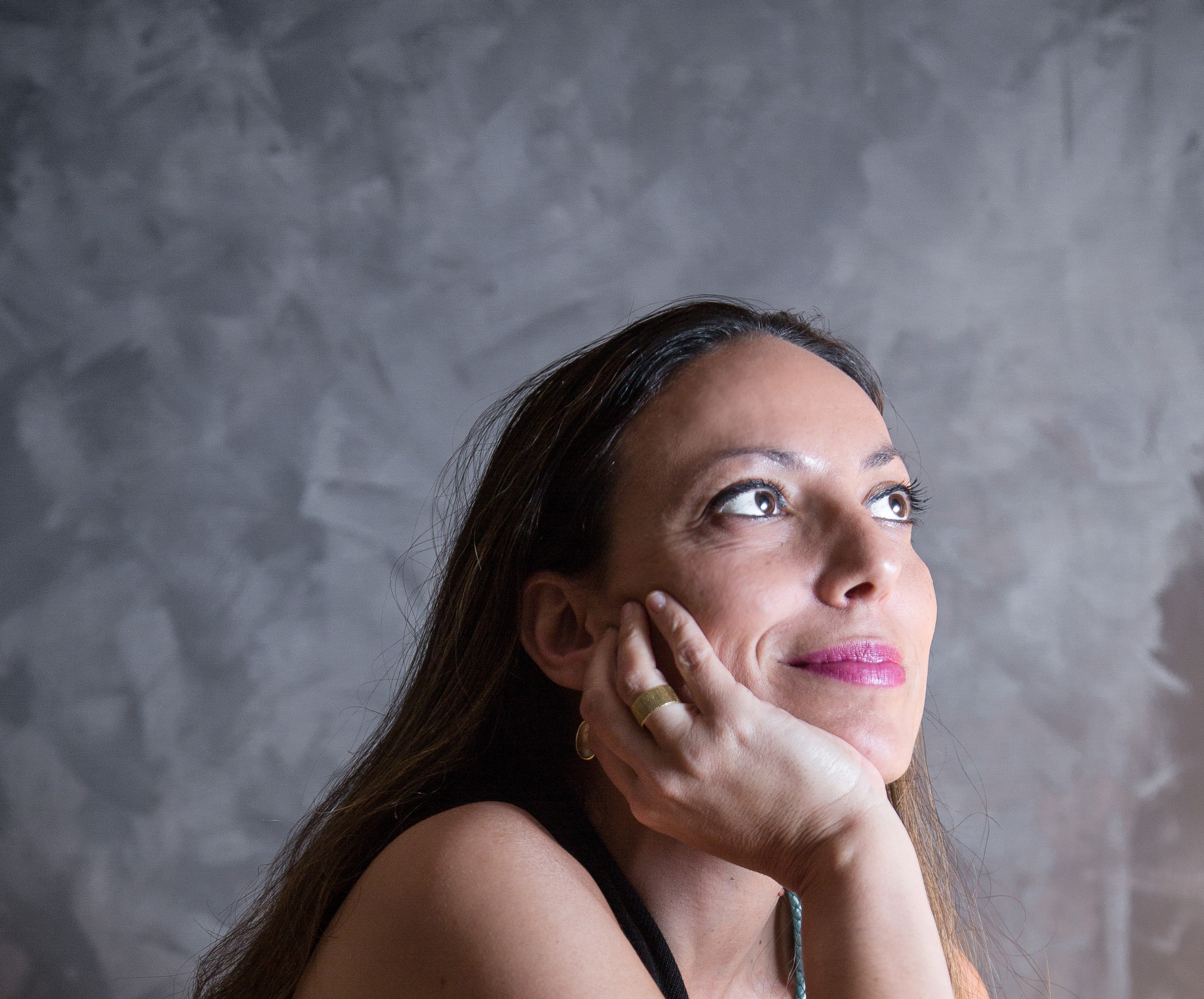 Haim Kimchi- Photographer